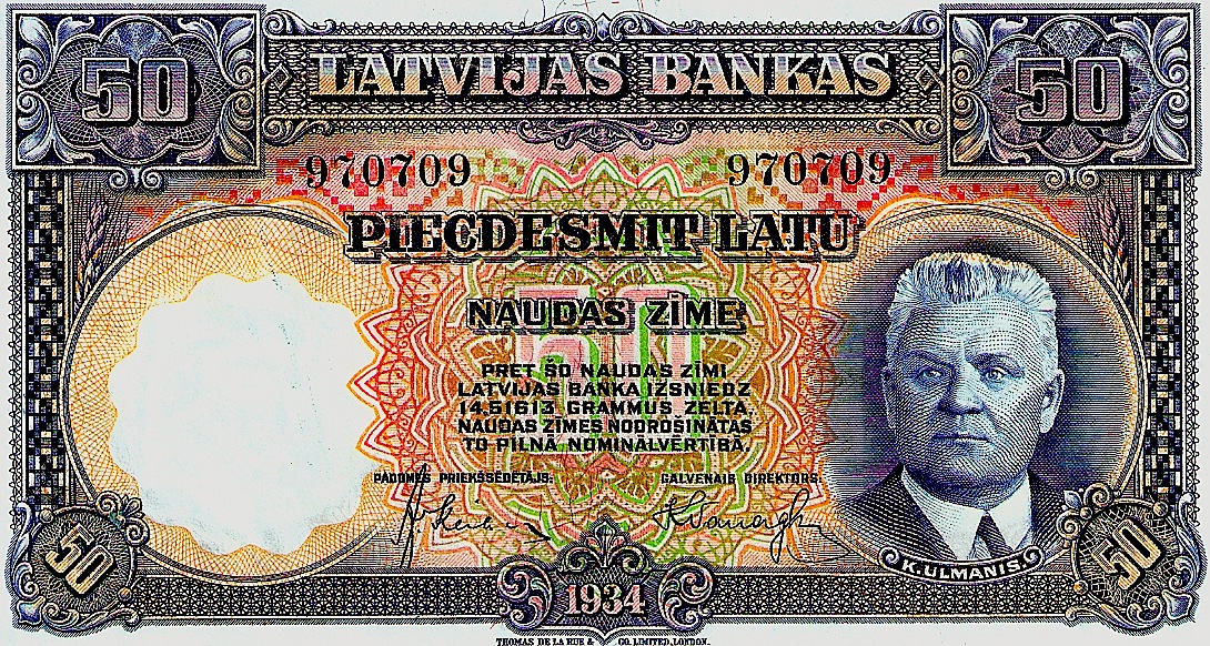 Latvian 50 lati note (1934)